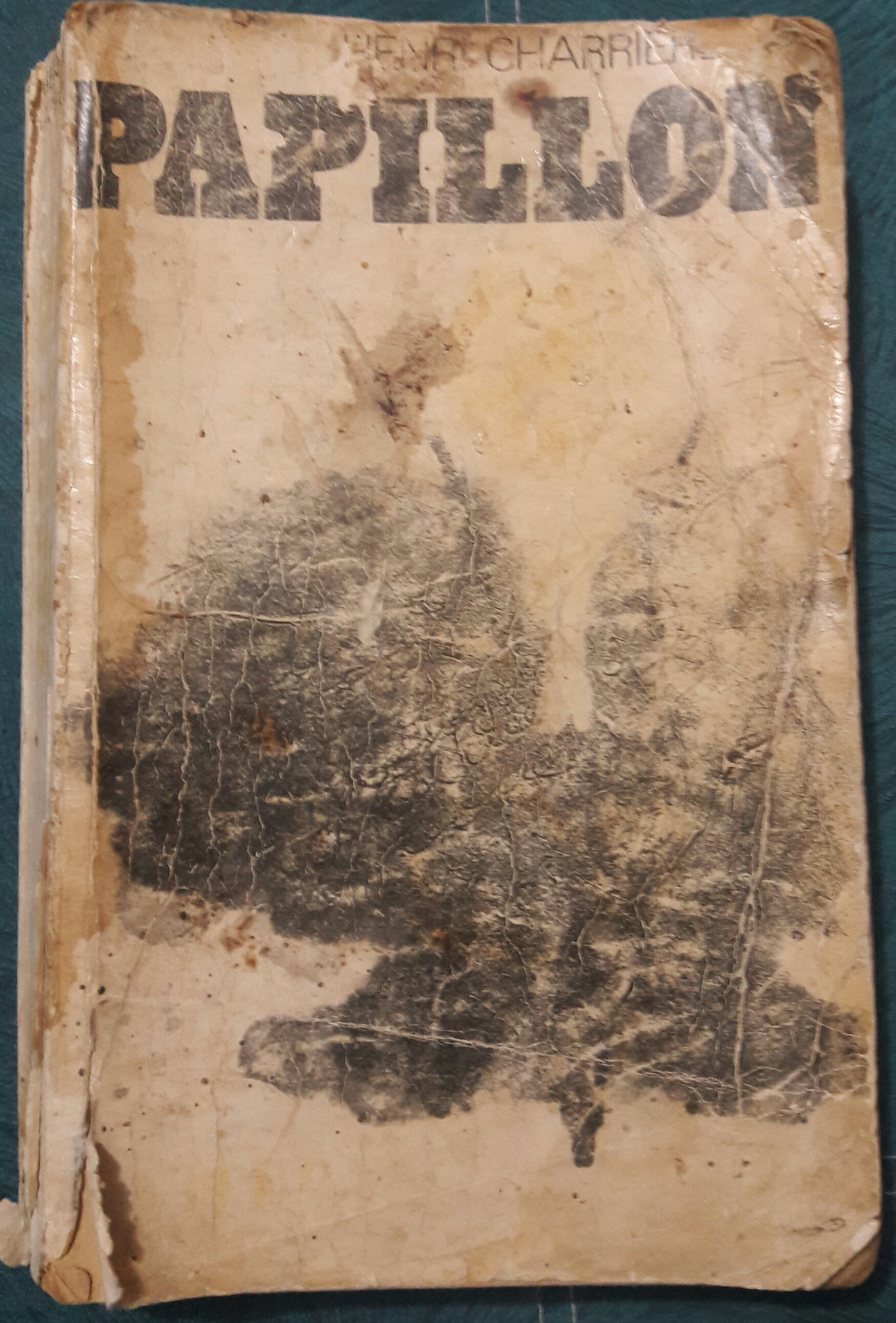 Libro Papillon